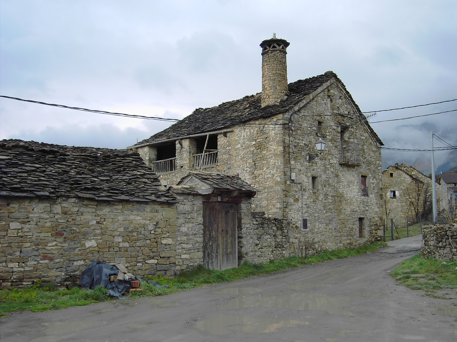 Una típica Casa Bloque pirenaica de la comarca altoaragonesa de Sobrarbe. La chimenea troncocónica, llamada Chaminera en aragonés, es un rasgo muy característico de las construcciones de esta comarca. Imagen tomada en Buerba, en el municipio de Fanlo